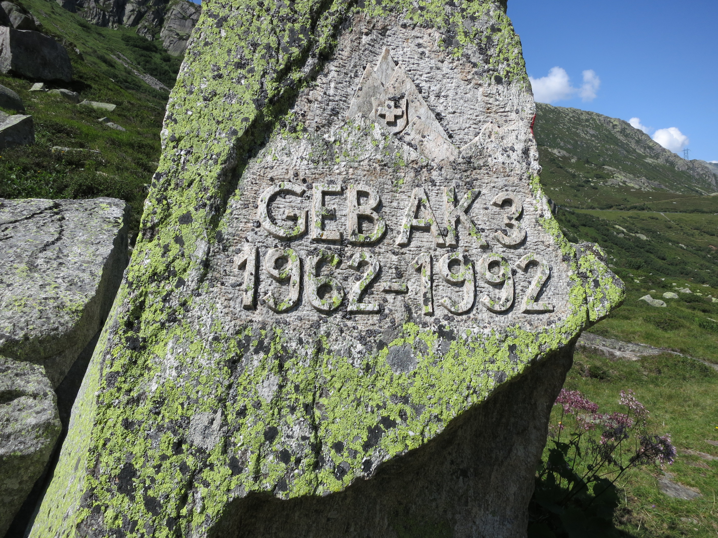 Saumweg, Gotthardpass, Airolo TI, Schweiz